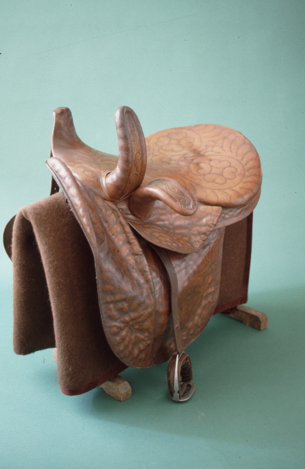 Damensattel